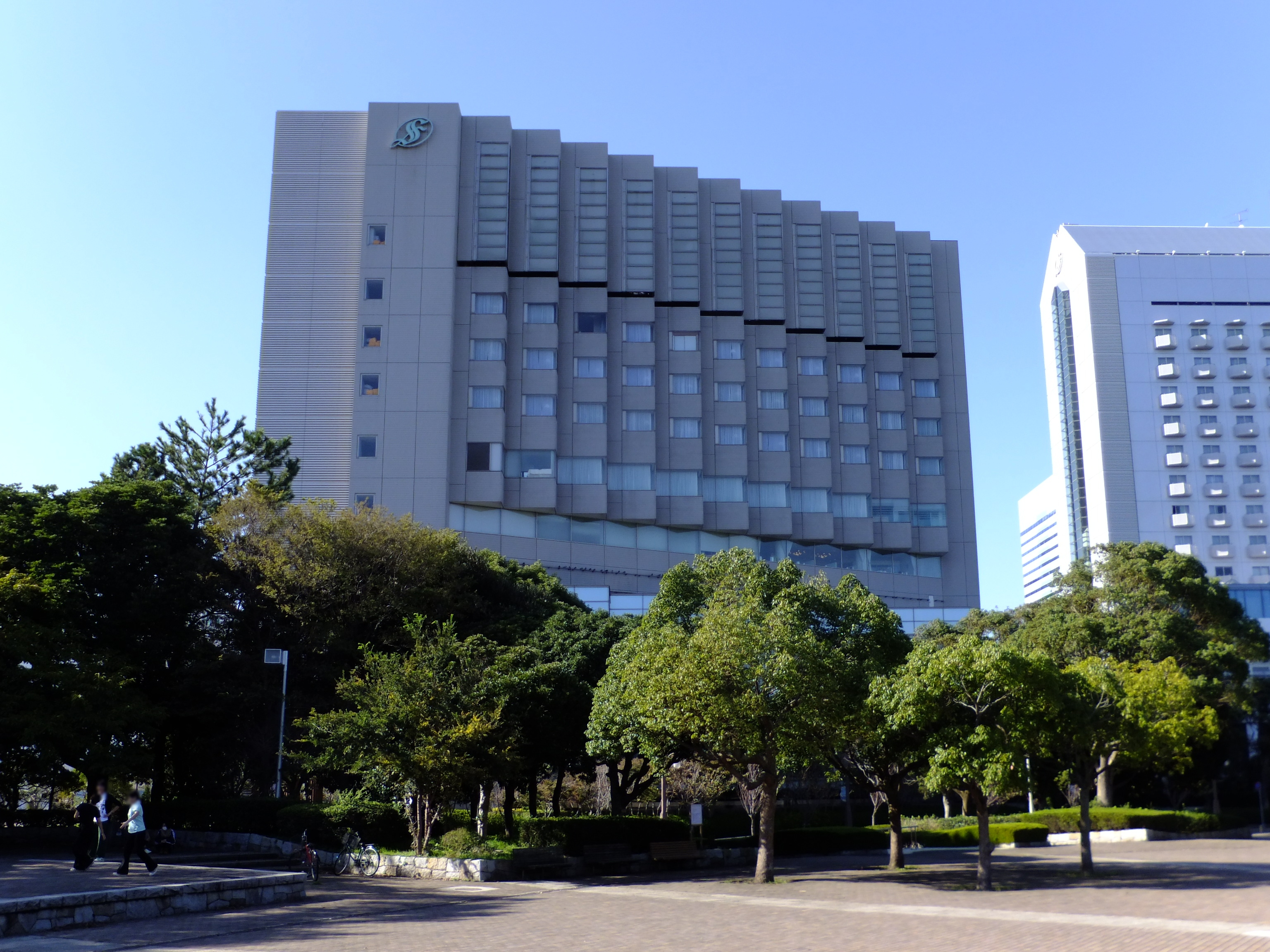 ホテルスプリングス幕張、アネックス館